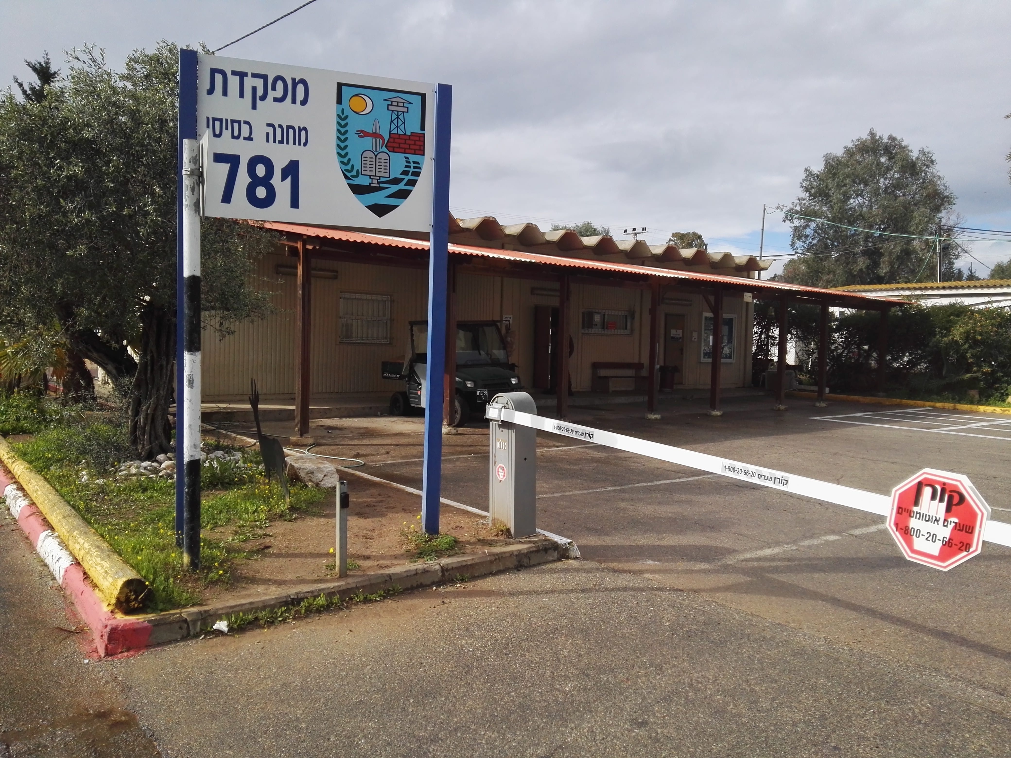 תמונה של לשכת מב"ס 781